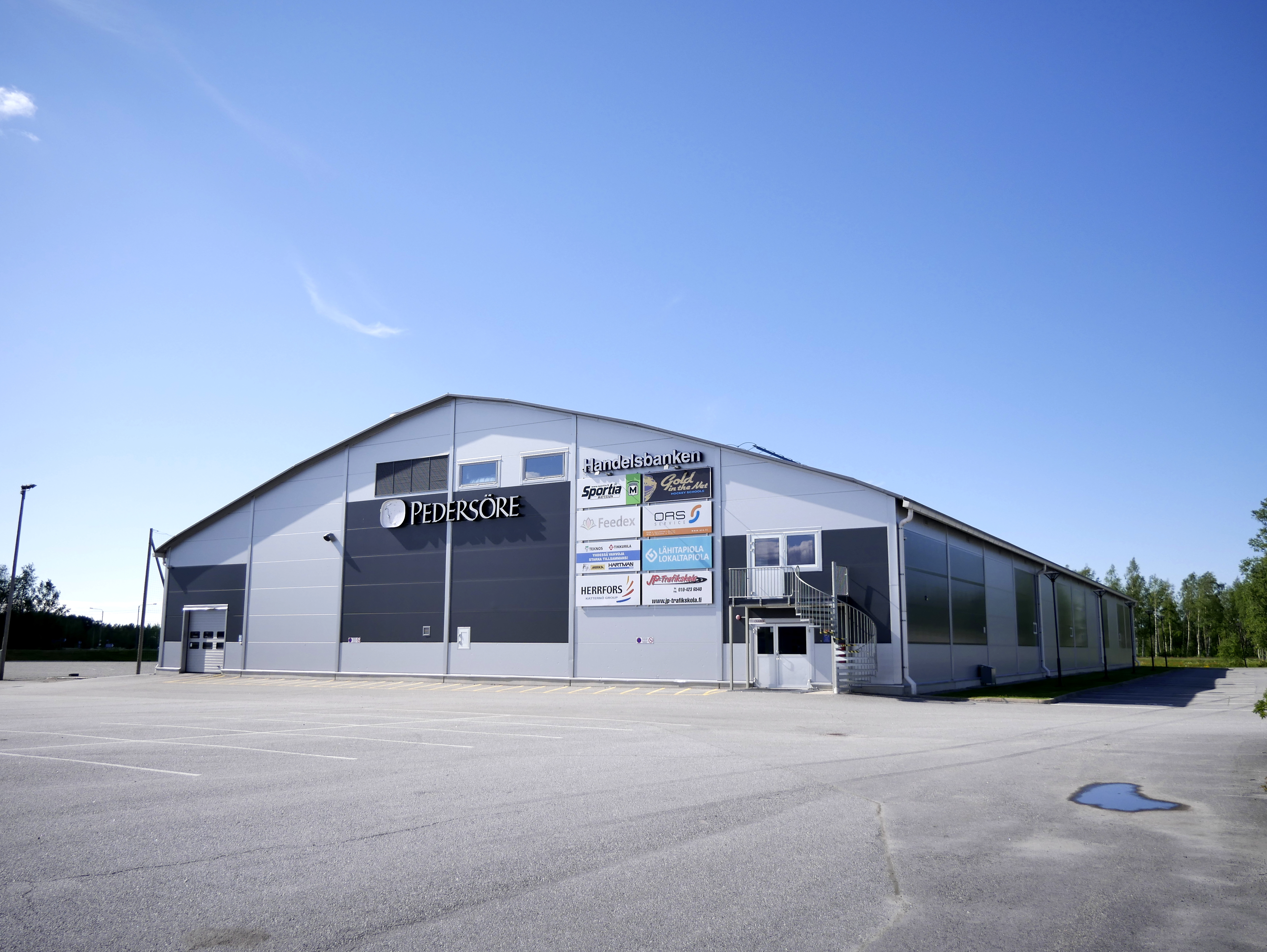 Anders Wiklöf Arena Pedersöressä.